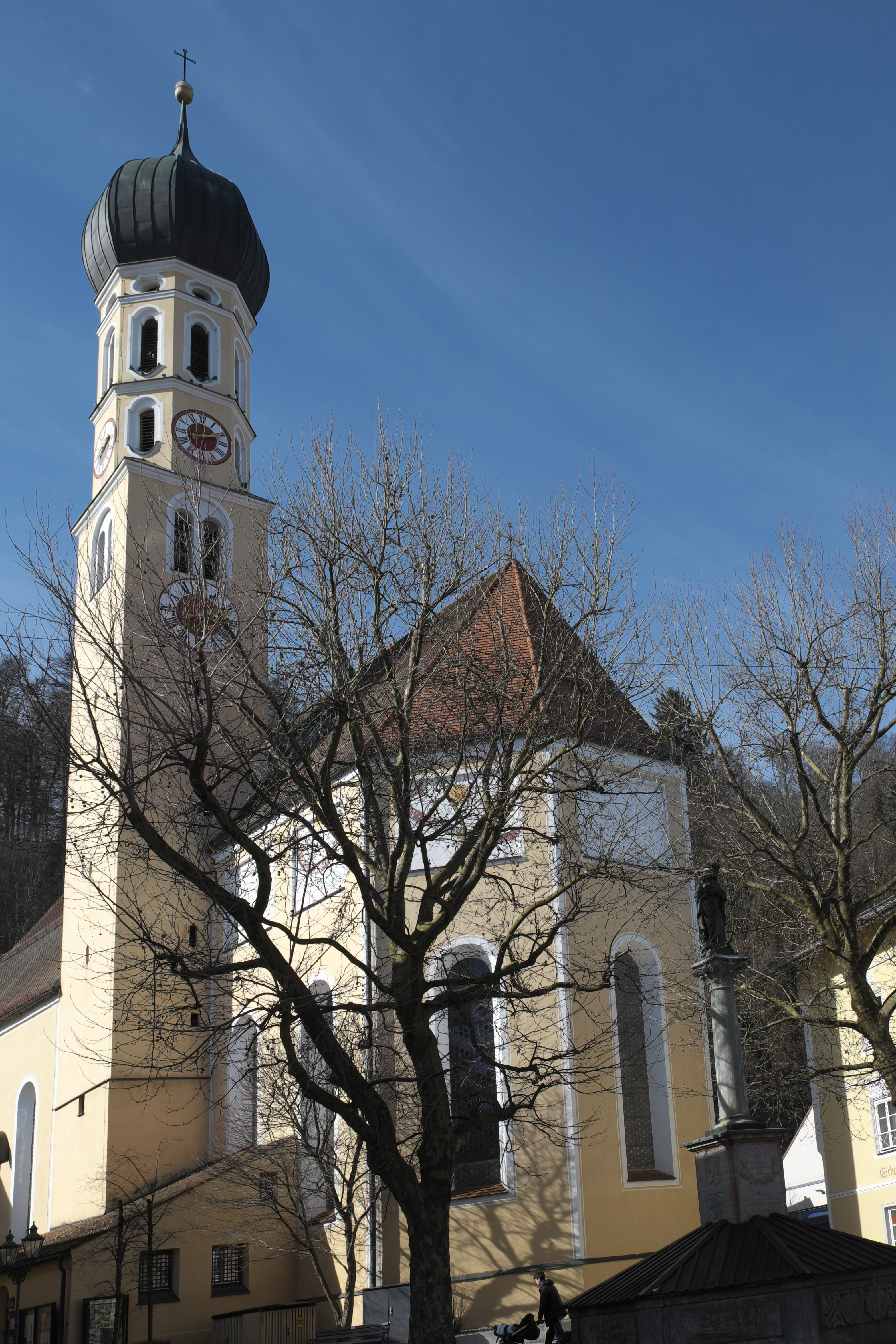 Katholische Stadtpfarrkirche St. Andreas in Wolfratshausen im Landkreis Bad Tölz-Wolfratshausen (Bayern/Deutschland), Turm mit Zwiebelhaube